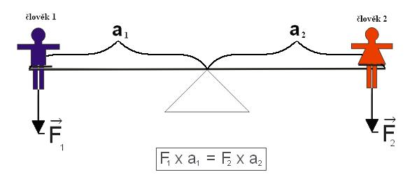 Houpačka v rovnovážném stavu, pro který platí vzorec F1.a1 = F2.a2